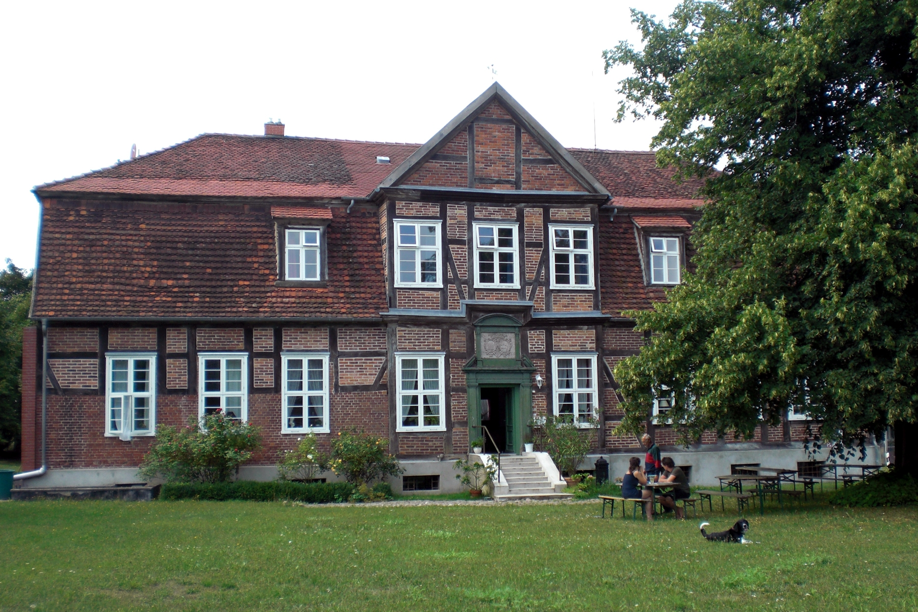 (Altes) Herrenhaus Schwiessel (Mecklenburg-Vorpommern) Datum: 13.08.2010 Urheber: onnola (Flickr-User) Quelle